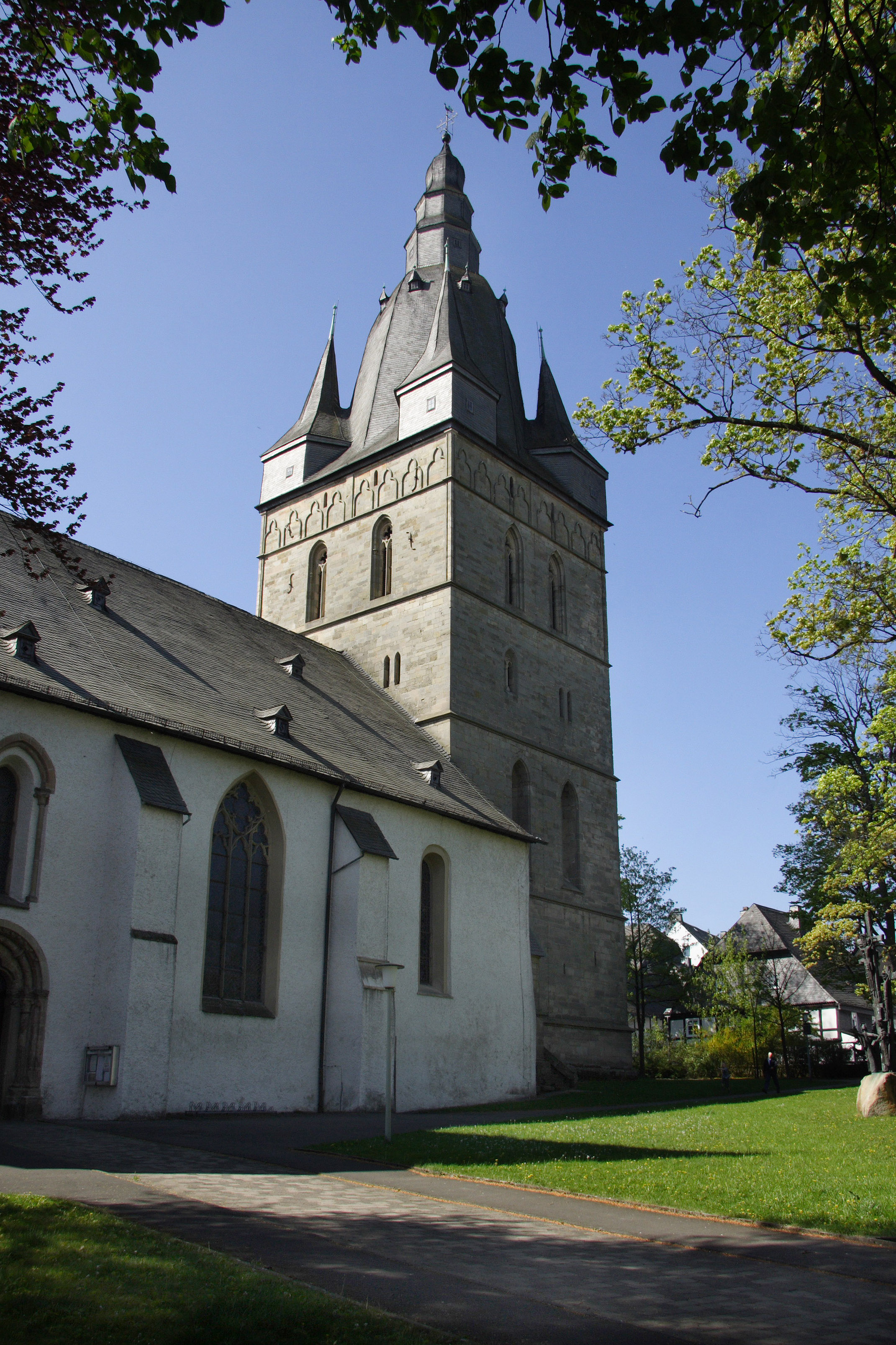 Turm der Briloner Propsteikirche This image shows a heritage building in Germany, located in the North Rhine-Westphalian city Brilon.